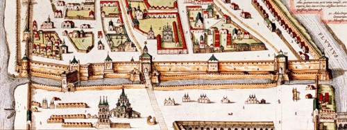 Водяной ров на Красной площади (XVII в.).